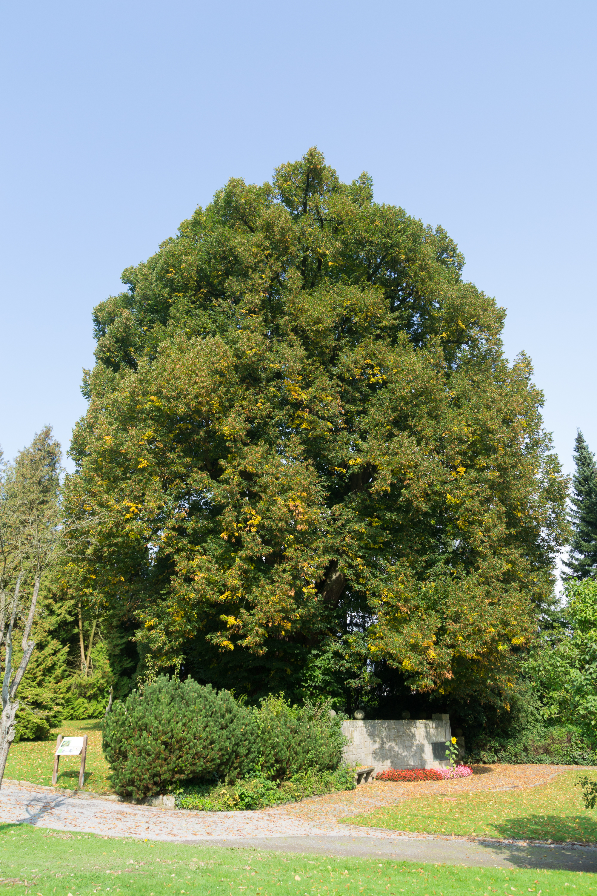 1000-jährige Linde, sogenannte Friedhofs- oder Wittekind-Linde, in Lügde-Elbrinxen